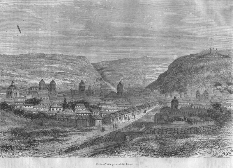 Vista de Cuzco